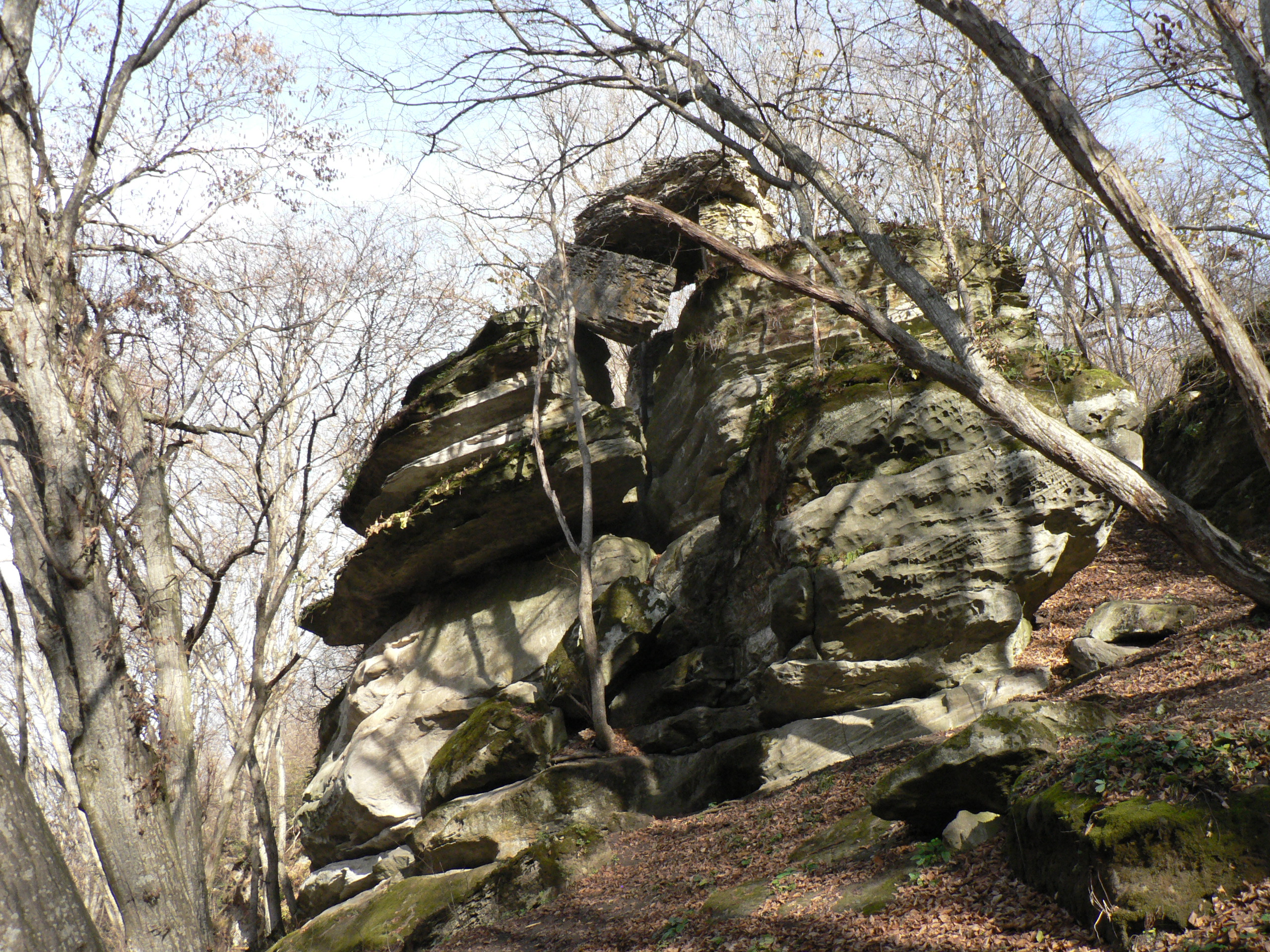 Чернівецький район, с. Бабчинці, вздовж р. Бушанки Ямпільський район с. Буша.